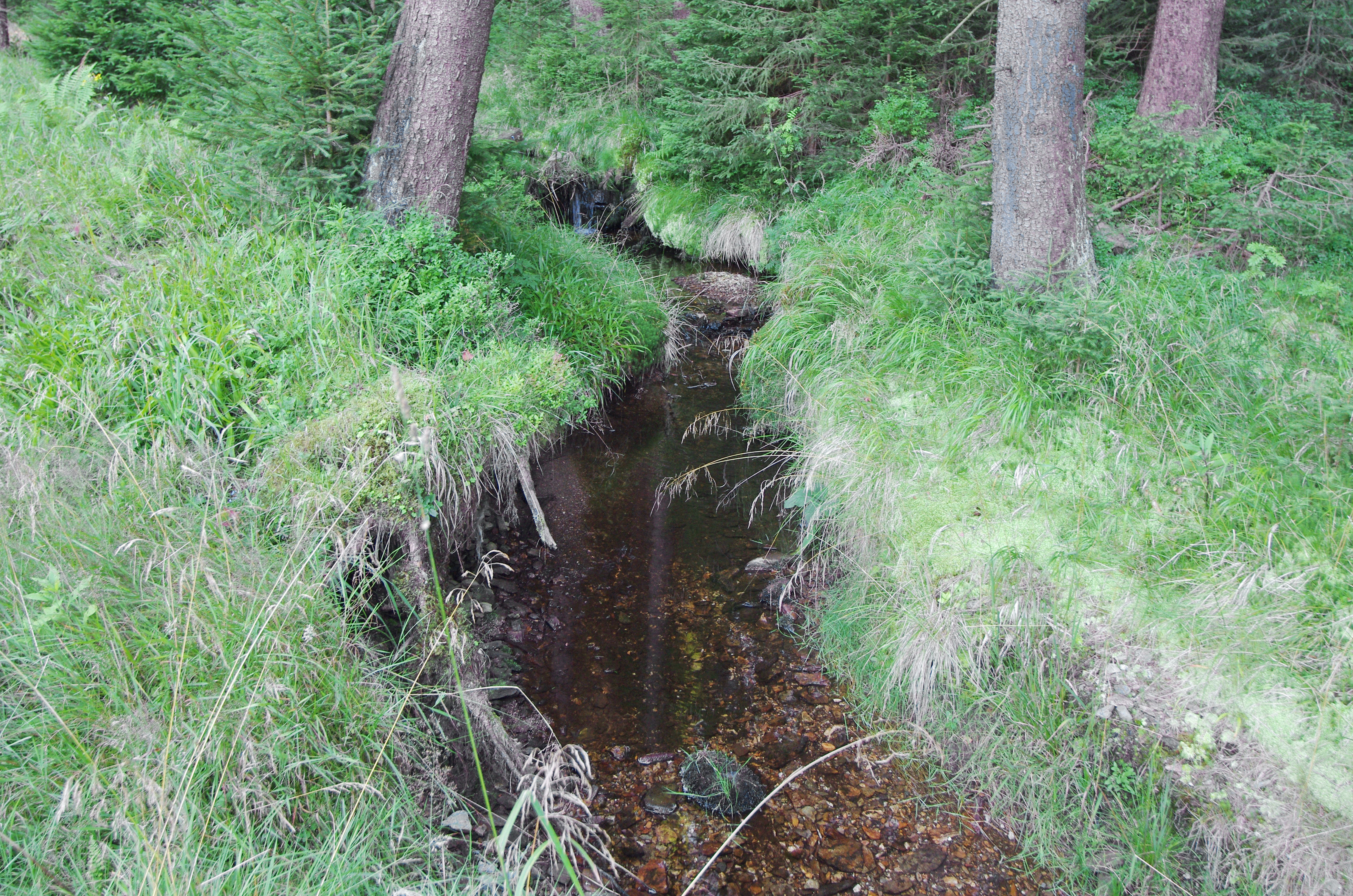 Podleský potok nedaleko osady Podlesí (Potůčky), okres Karlovy Vary